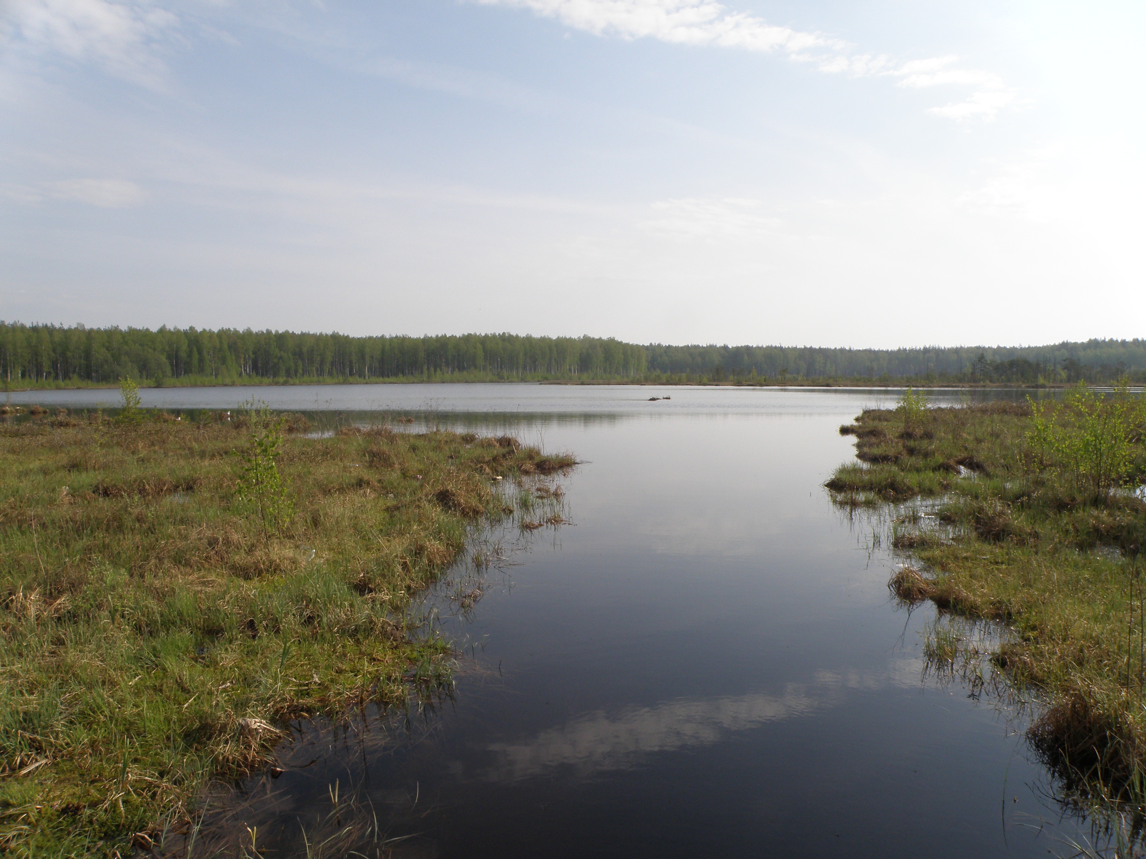 Дарьино озеро близ Новок